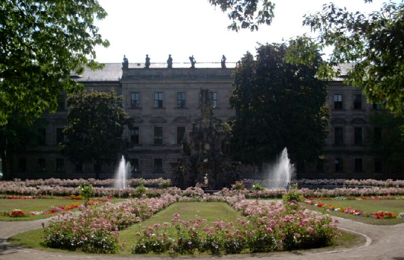 Schloss in Erlangen